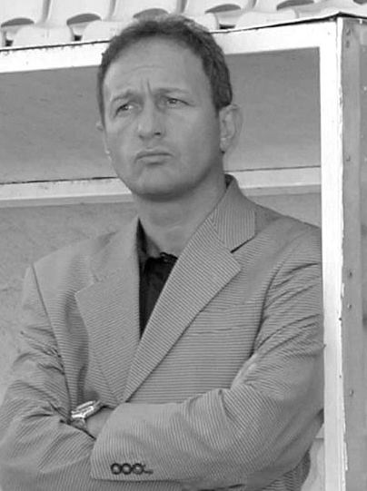 Hürser Tekinoktay Çanakkale Dardanelspor 2002 Yılı